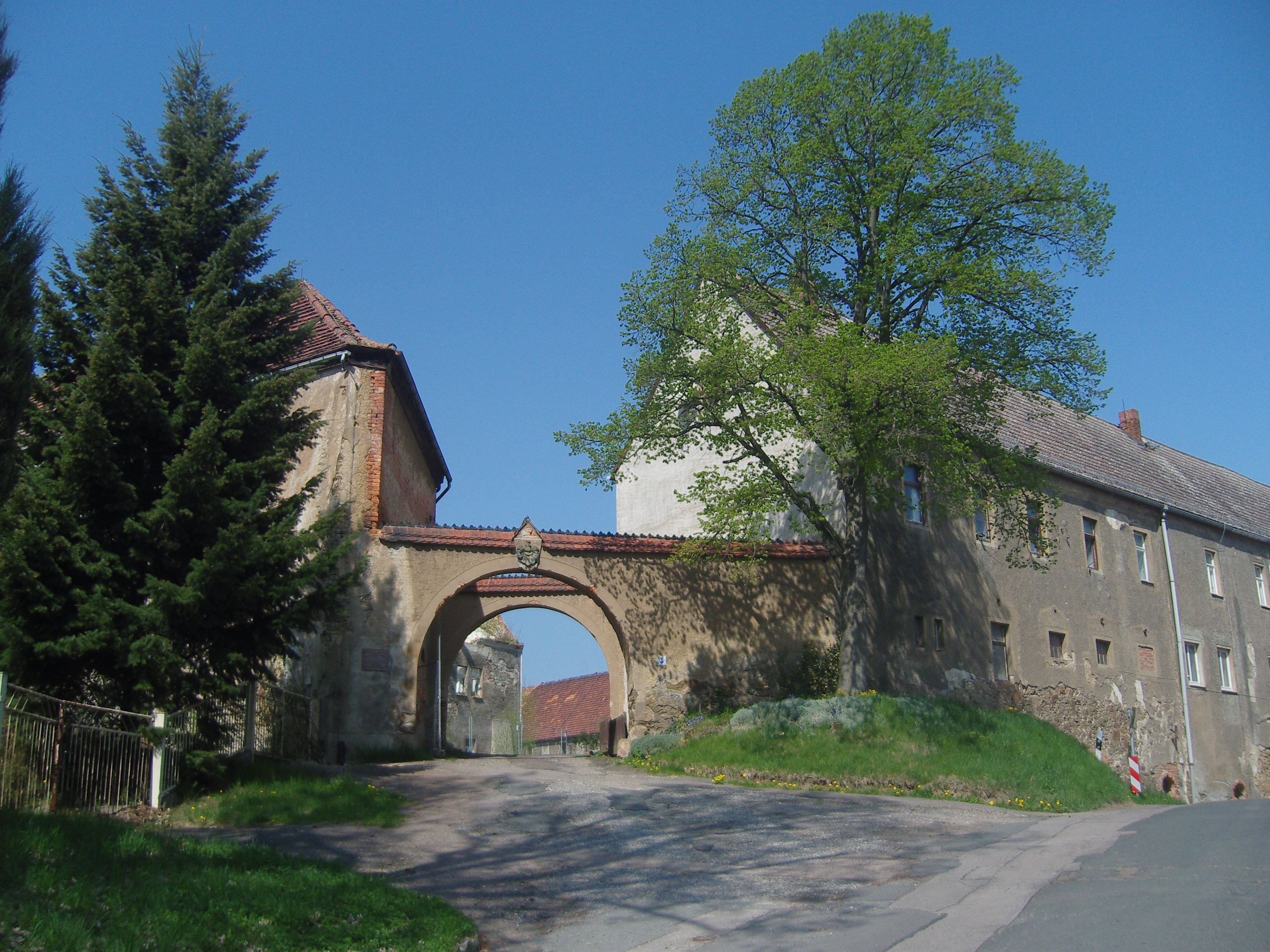 Herrenhaus in Deutschenbora